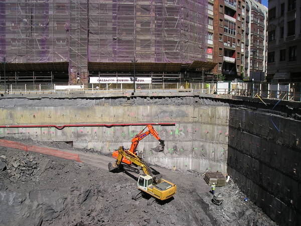 Kanpuzanoko aparkalekua.